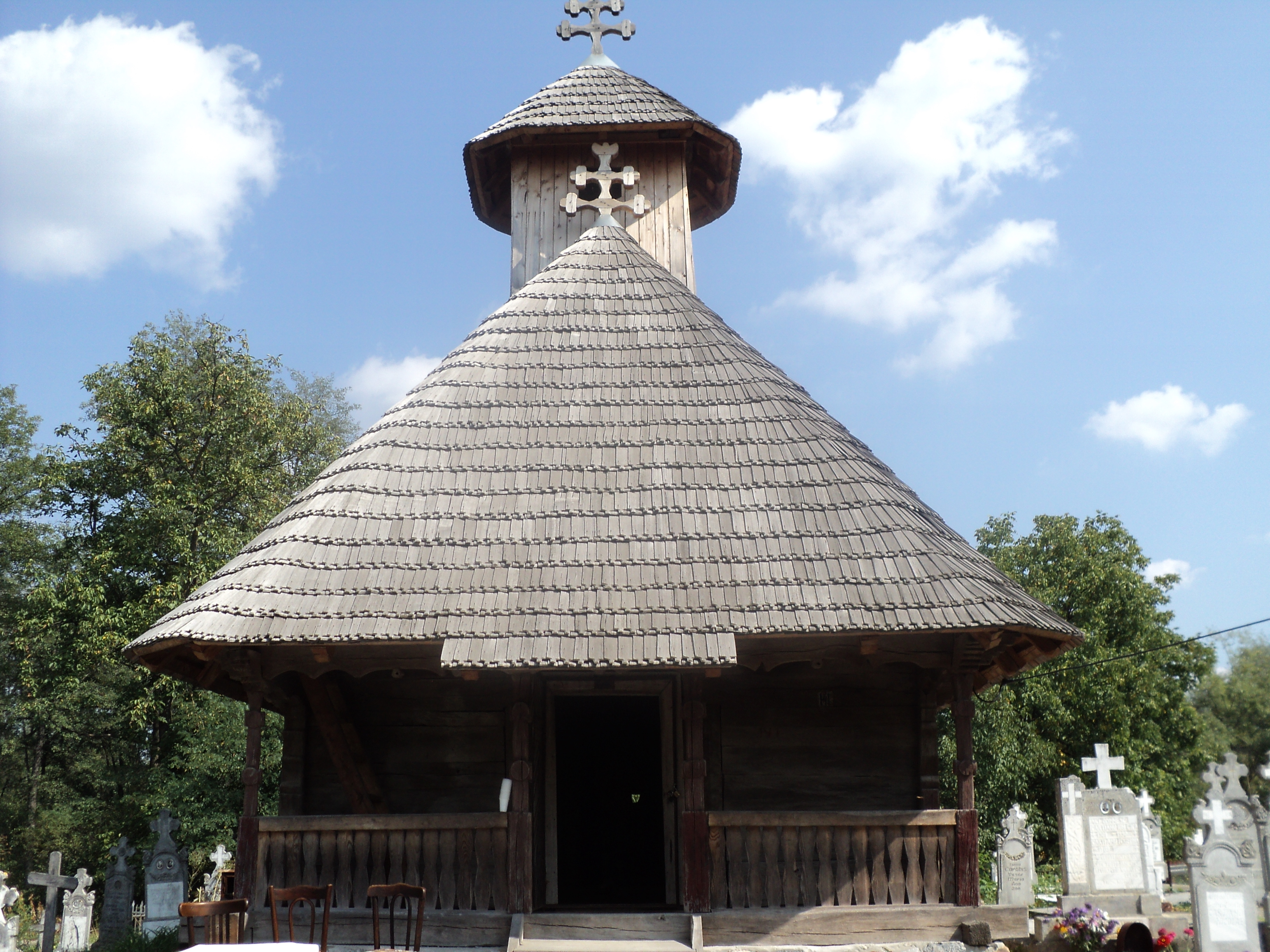 Biserica de lemn "Sf. Voievozi" sat Stolojani; comuna Bălești; judet Gorj